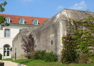 Ancien Bunker allemand du Quartier Gramont - Saint-Germain-en-Laye